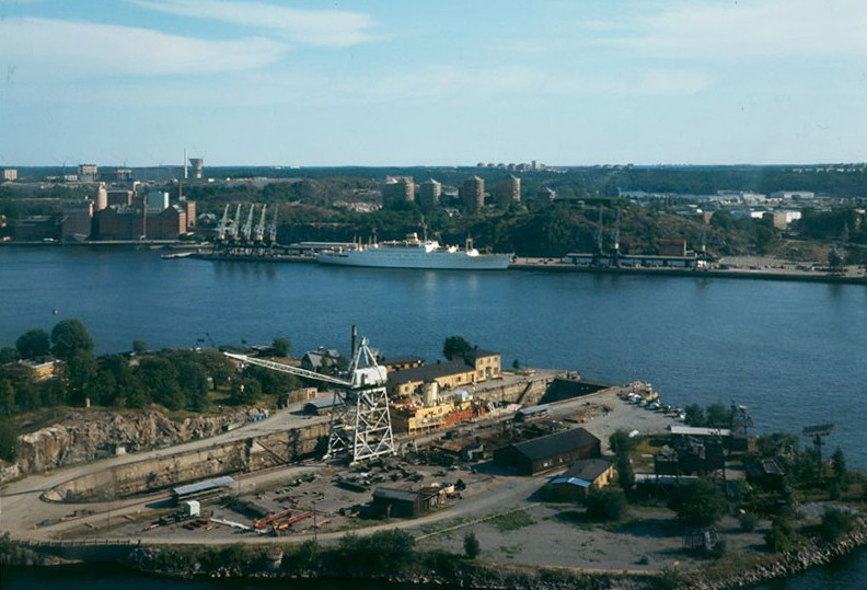 Vy över Beckholmen och Stockholms inlopp med Södermalm (Masthamnen) och Danviken med Nacka i bakgrunden